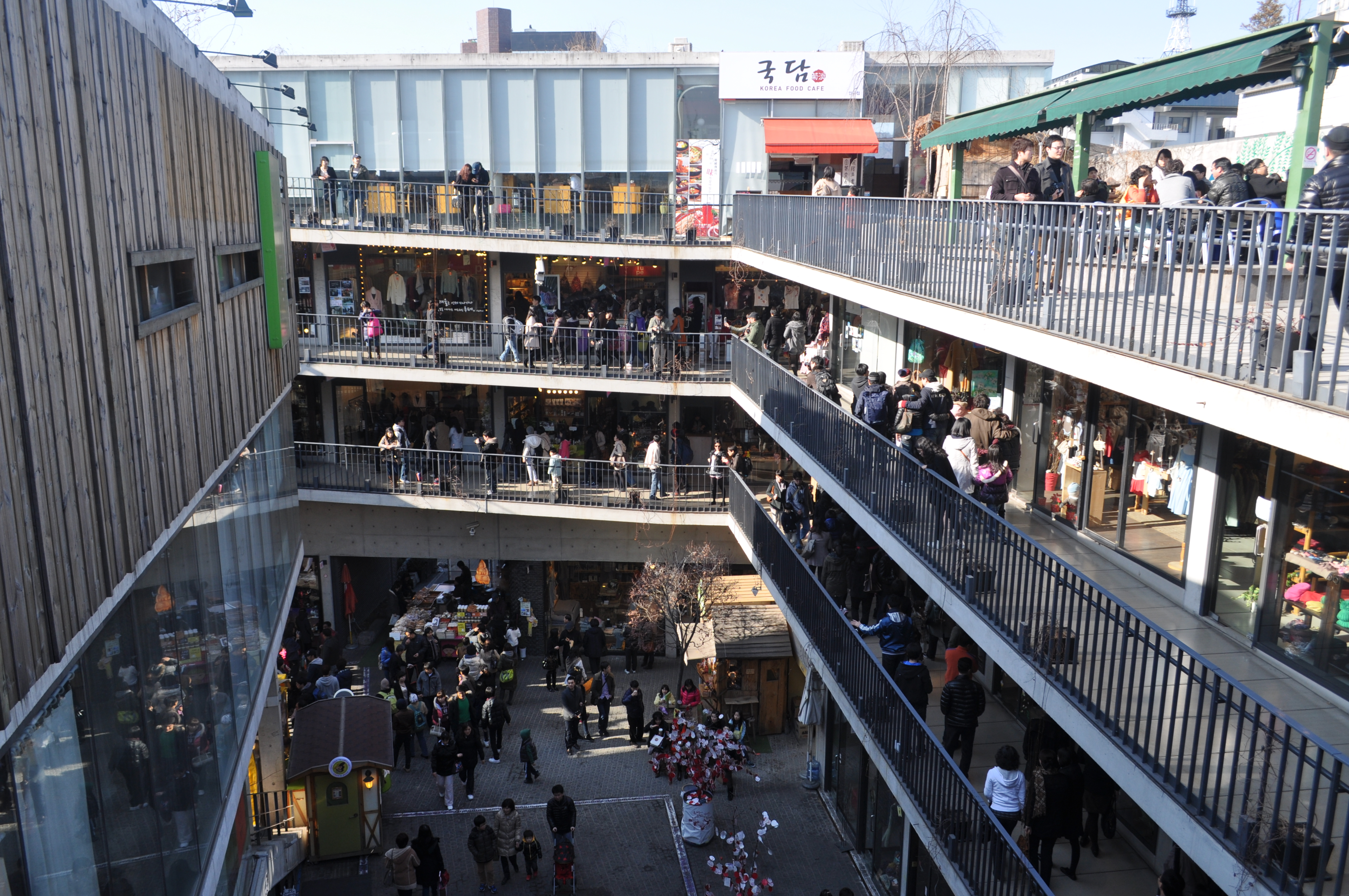 쌈지길 맨 위층에서 바라본 쌈지길의 풍경